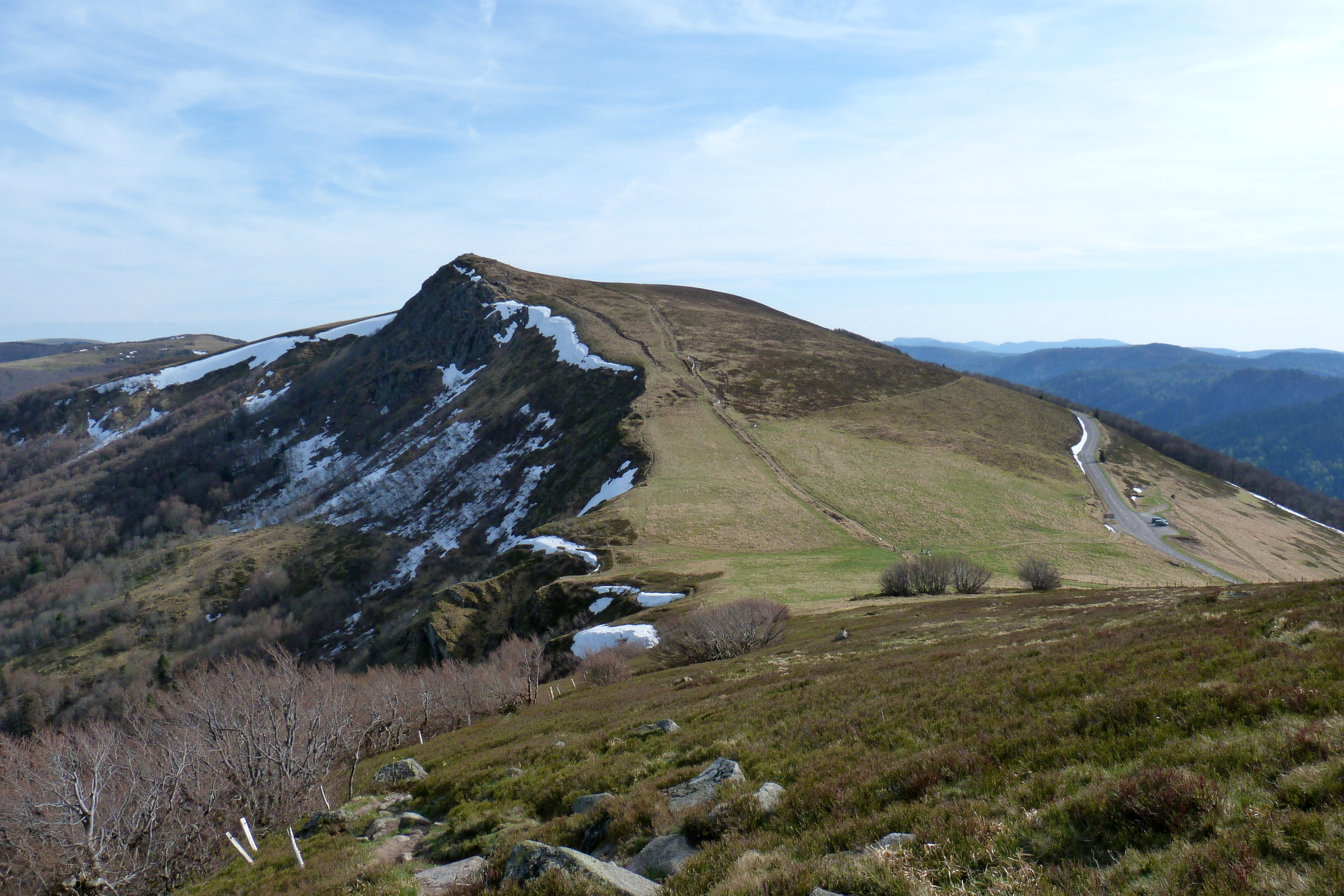 Le Rothenbachkopf vu depuis le Rainkopf, massif des Vosges (France).